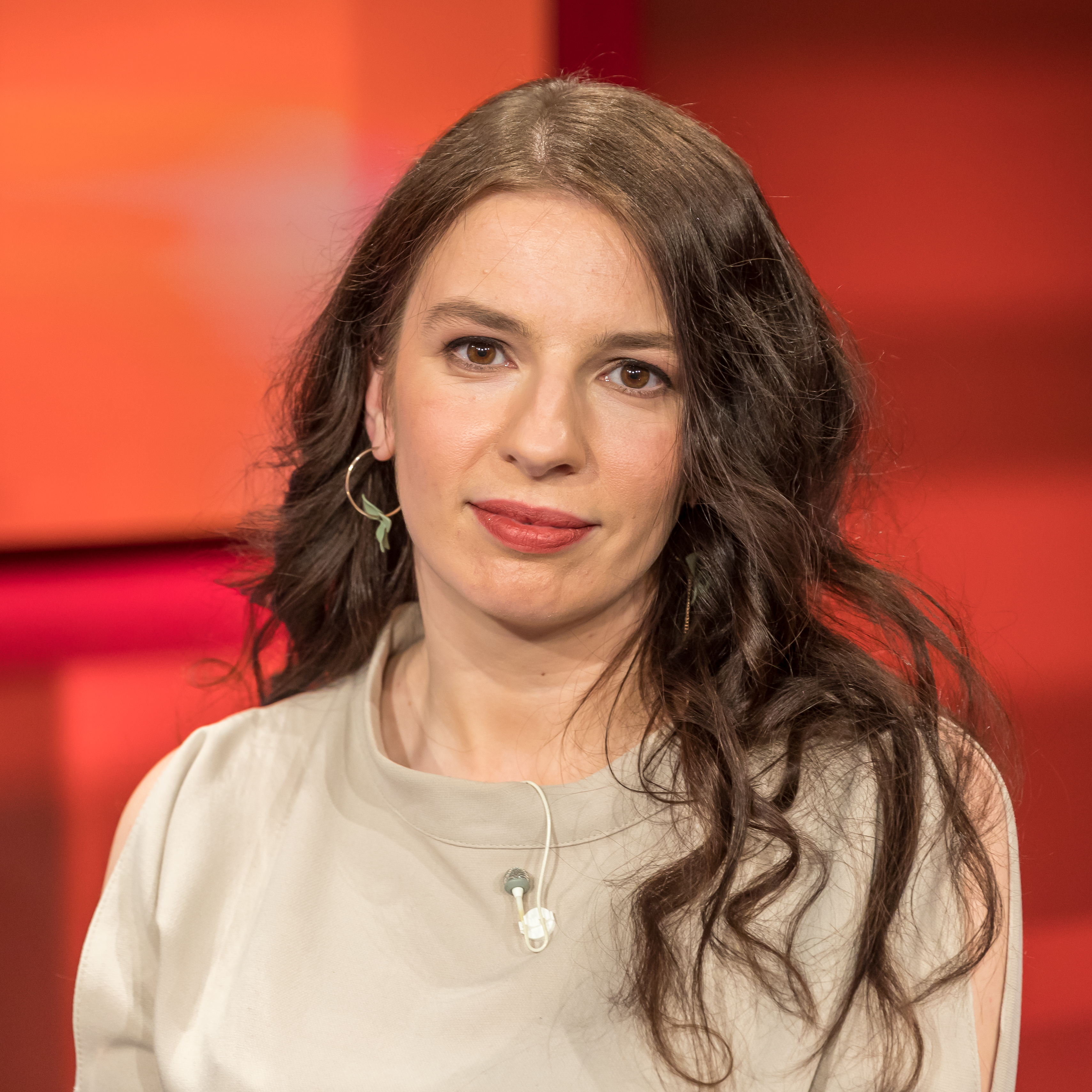 Pressetermin nach der Sendung „Hart aber Fair“ am 10. Februar 2020. Thema der Sendung: „Jetzt auch die CDU: Stürzt die nächste Regierungspartei ins Chaos?" Foto: Marina Weisband, Publizistin und Psychologin; Mitglied der Grünen, ehemalige Geschäftsführerin der Piratenpartei